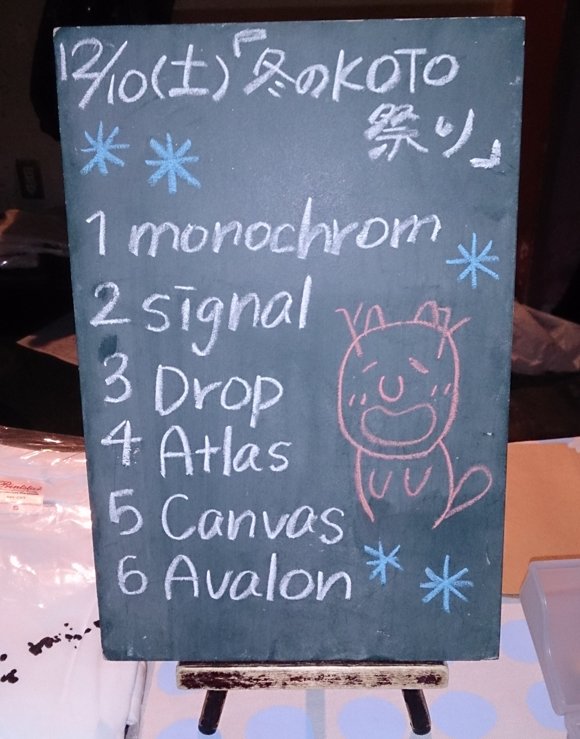 amiinAセトリボード(20161210(1))